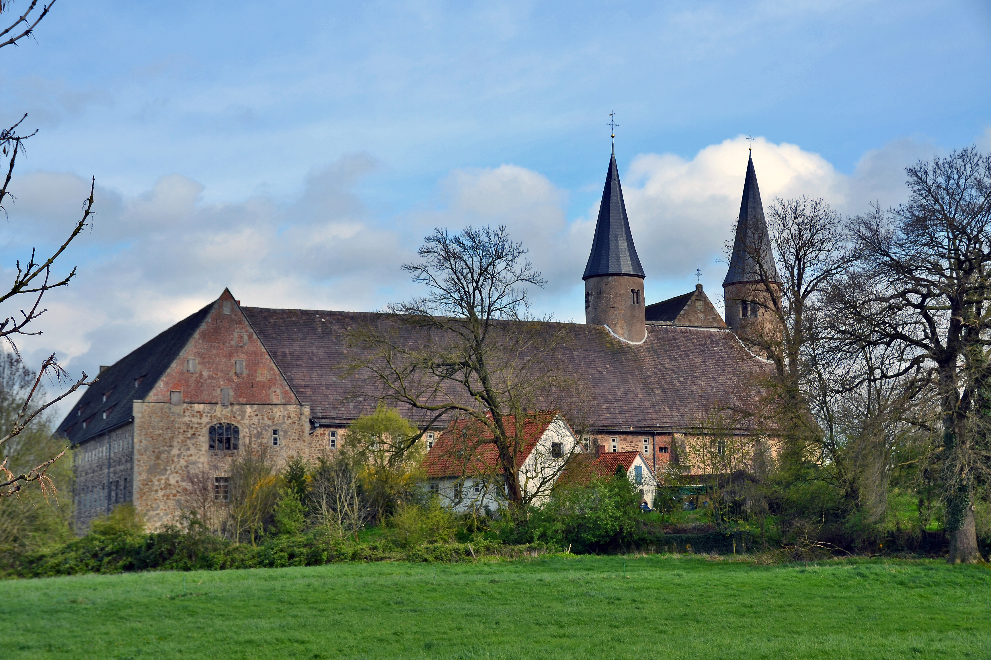 Kloster Möllenbeck, Ansicht aus Westen